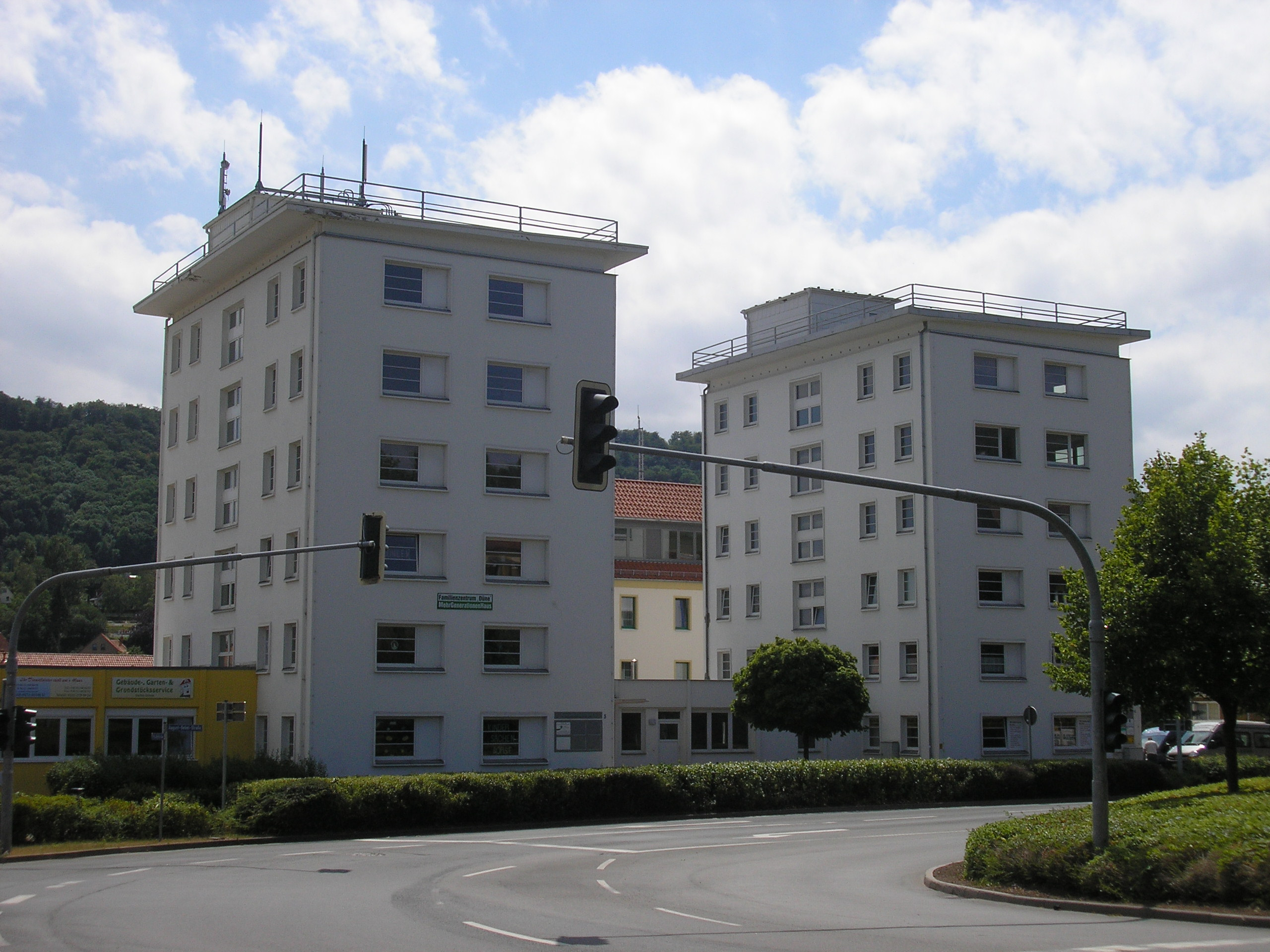 Zwei Hochhäuser am Lohberg in Sondershausen (Thüringen)